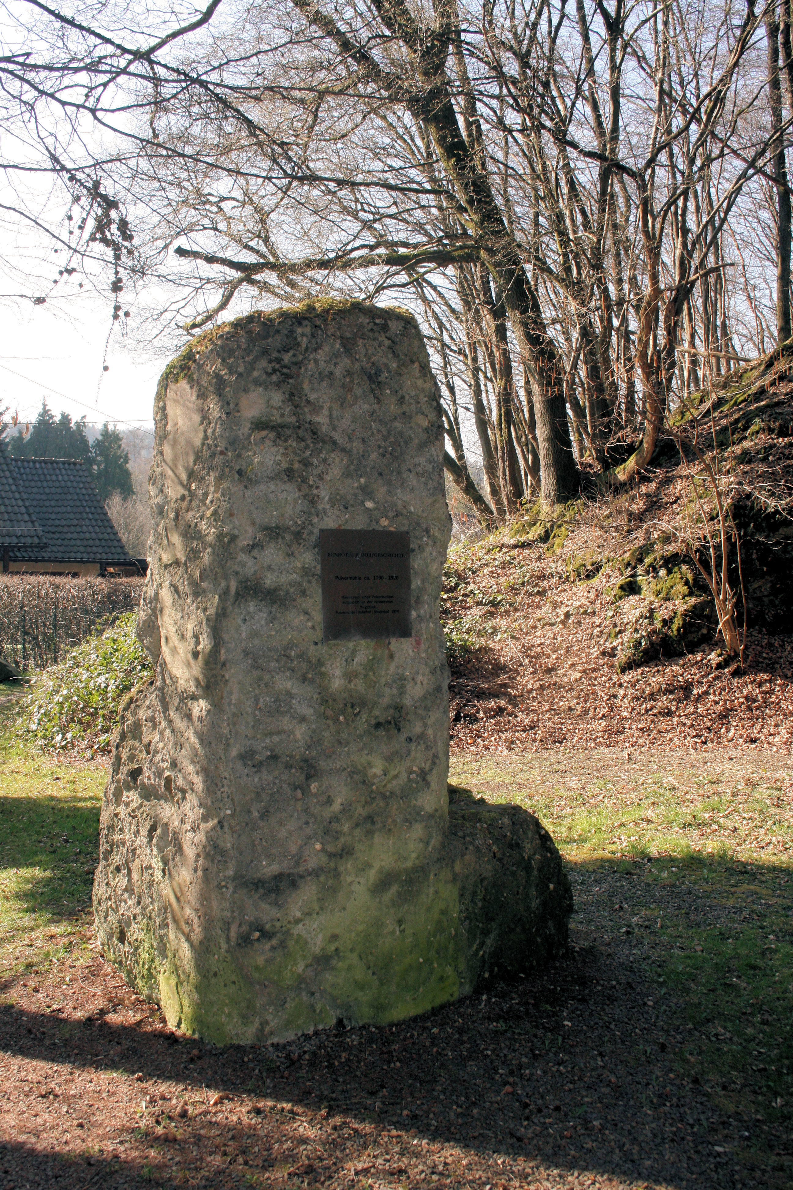 Fundament Pulverbunker Benroth